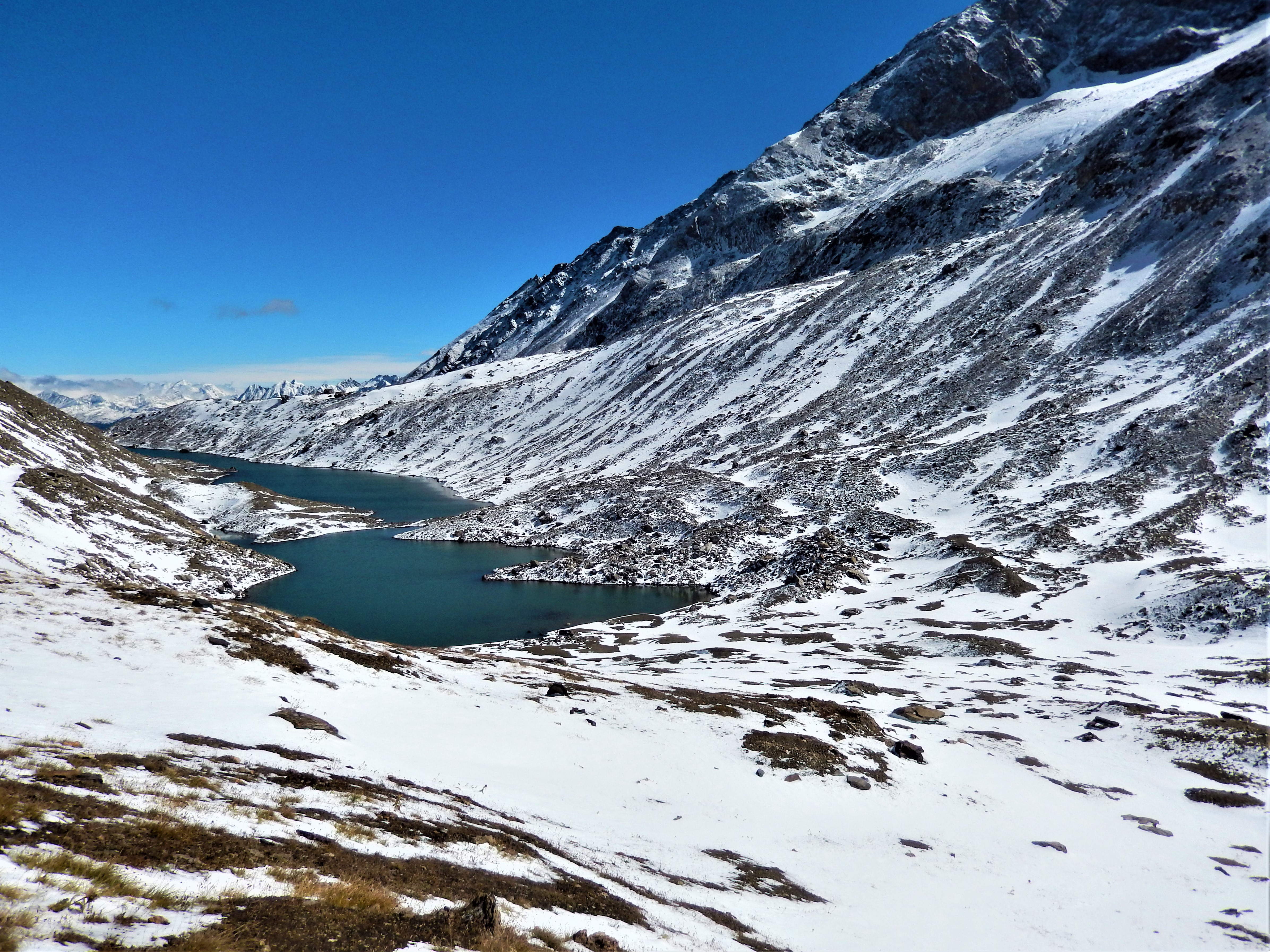 Berglandschaft